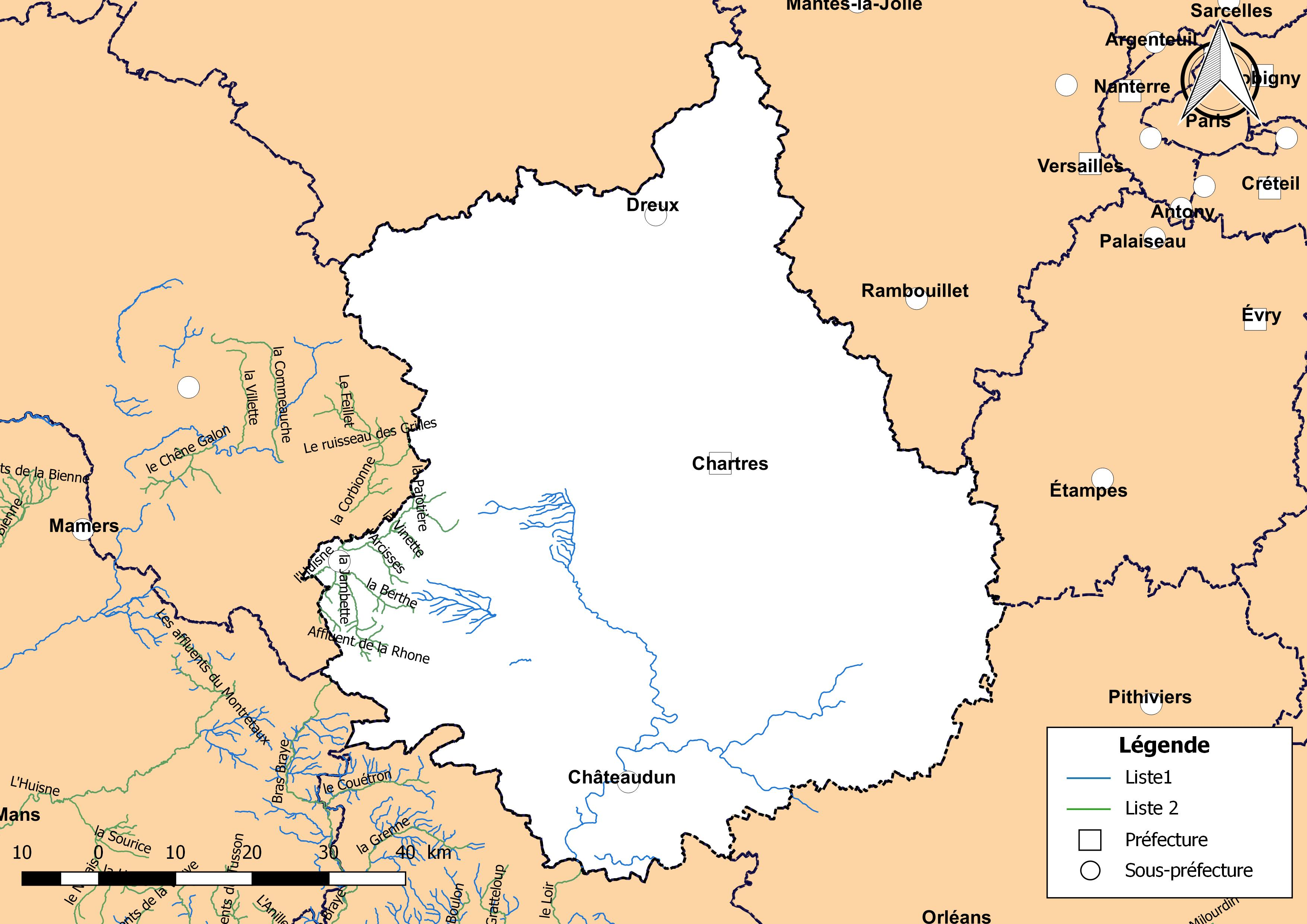 classement des cours d'eau du département d'Eure-et-Loir (France) au titre de la continuité écologique (article L214.17 I du Code de l'environnement).